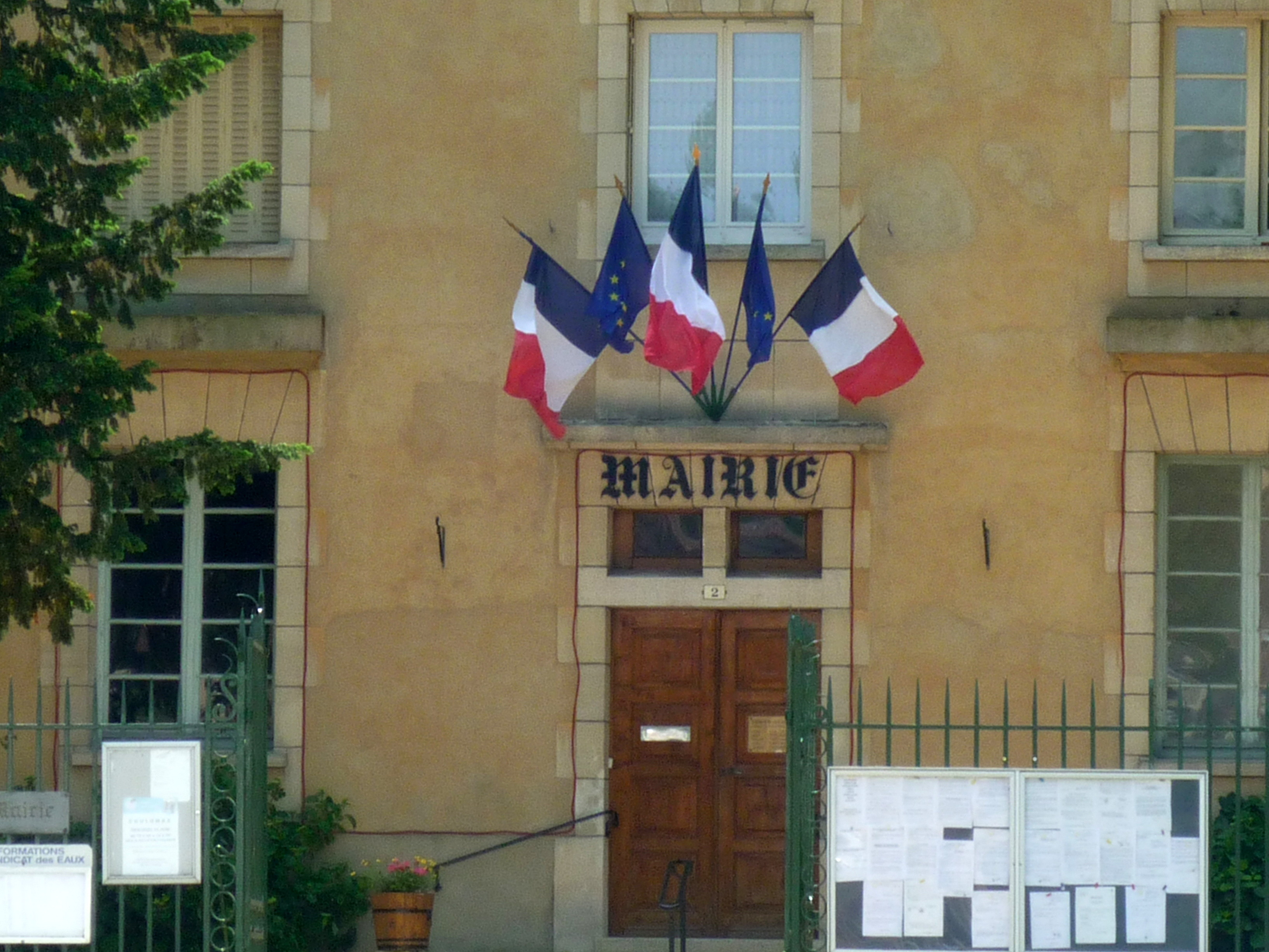 Mairie de Coulombs, Eure-et-Loir (France).